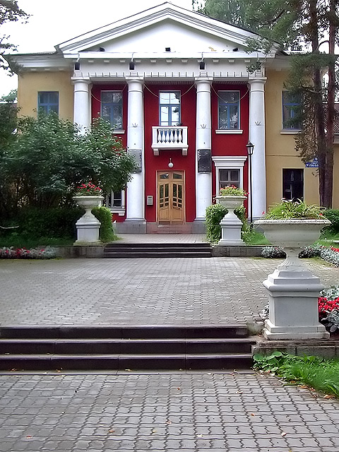 Дом ученых в Дубне